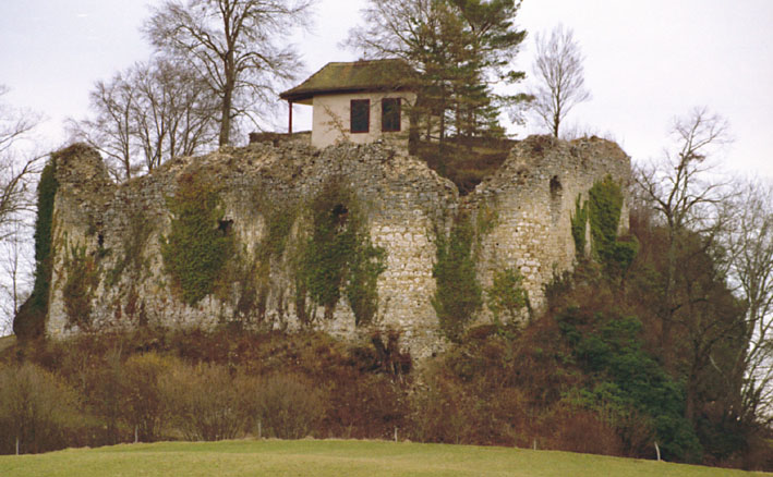 Burg Neu-Schauenburg Ansicht von Westen mit Aussichtspavillon